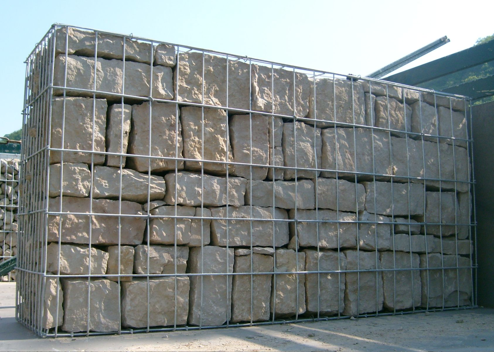 Eng Gabioun mat sortéierter Front - 15. Mee 2008.